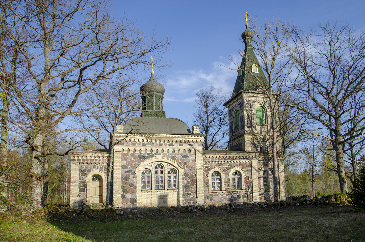 Kastna church